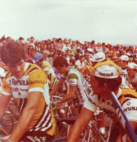 Départ d'un criterium cycliste en Bretagne au début des années 80, avec en premier plan des coureurs de l'équipe Renault - Gitane.